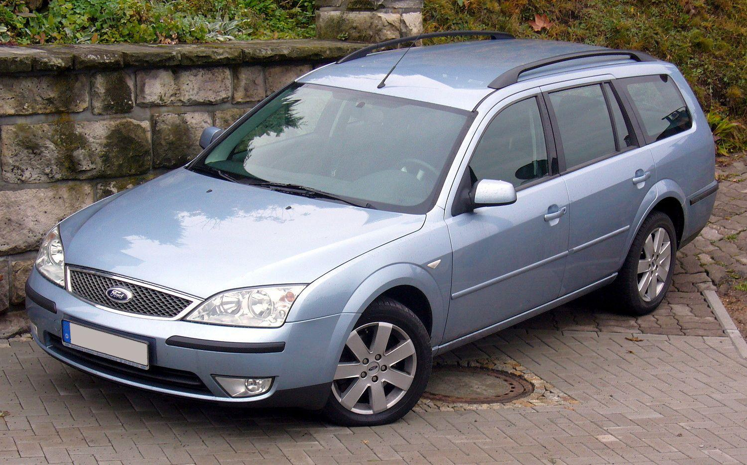 Ford Mondeo II Turnier Facelift